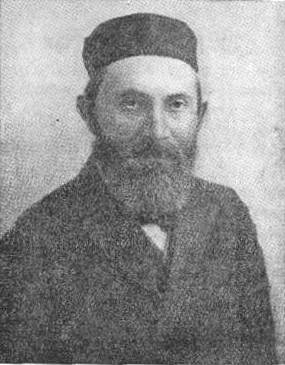 אברהם משה לונץ